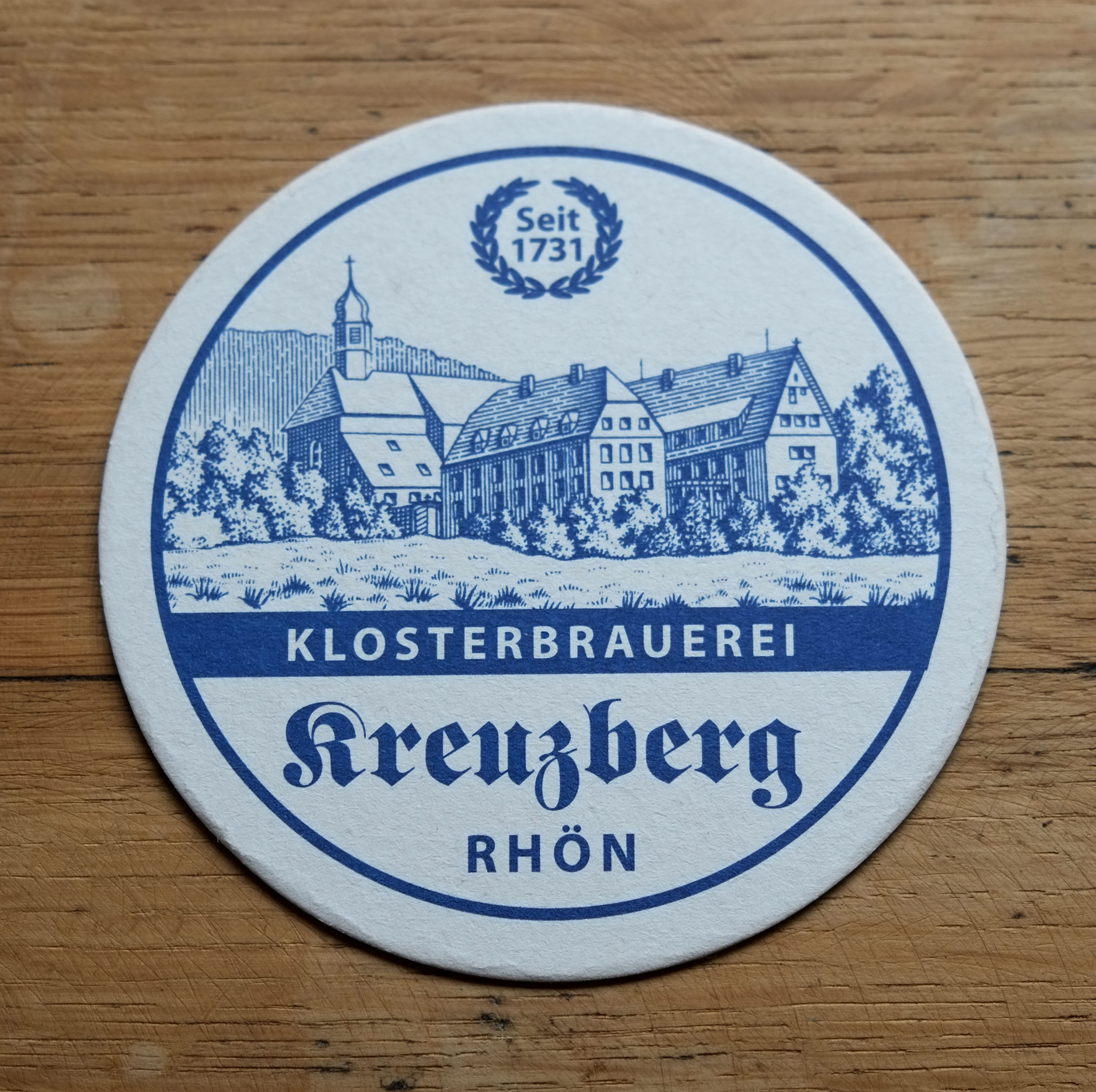 Bierdeckel der Brauerei des Klosters Kreuzberg